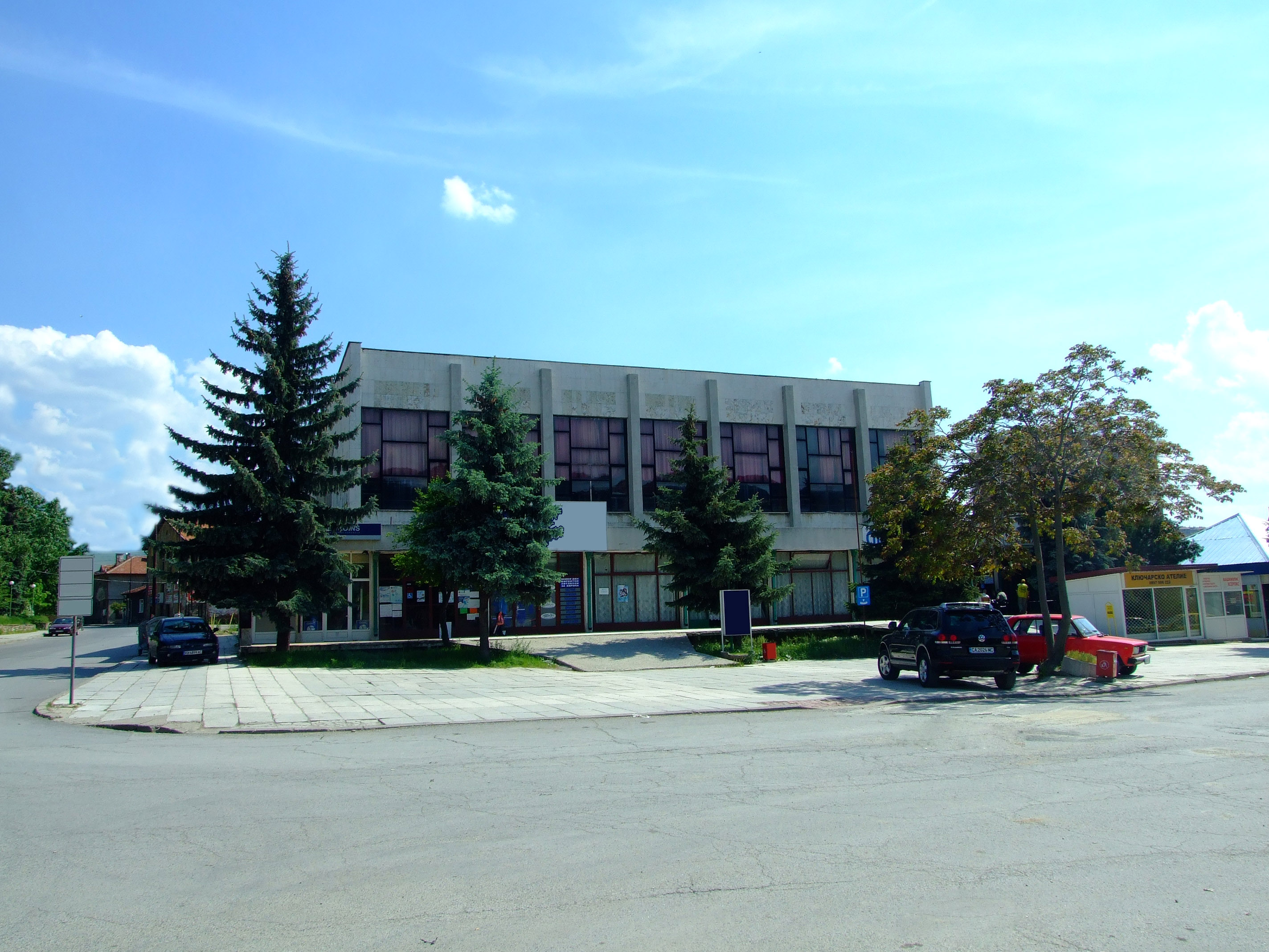 Sportna Zala